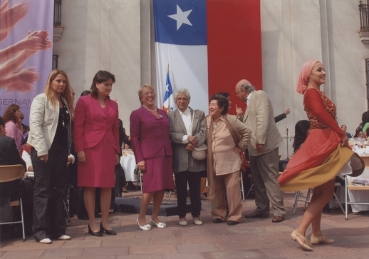 Mireya Baltra junto a Michelle Bachelet, Camen Lazo y Laura Albornoz en acto frente a La Moneda.